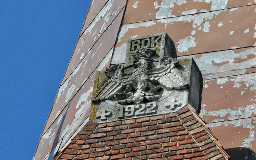 Костел Успення Пресвятої Богородиці